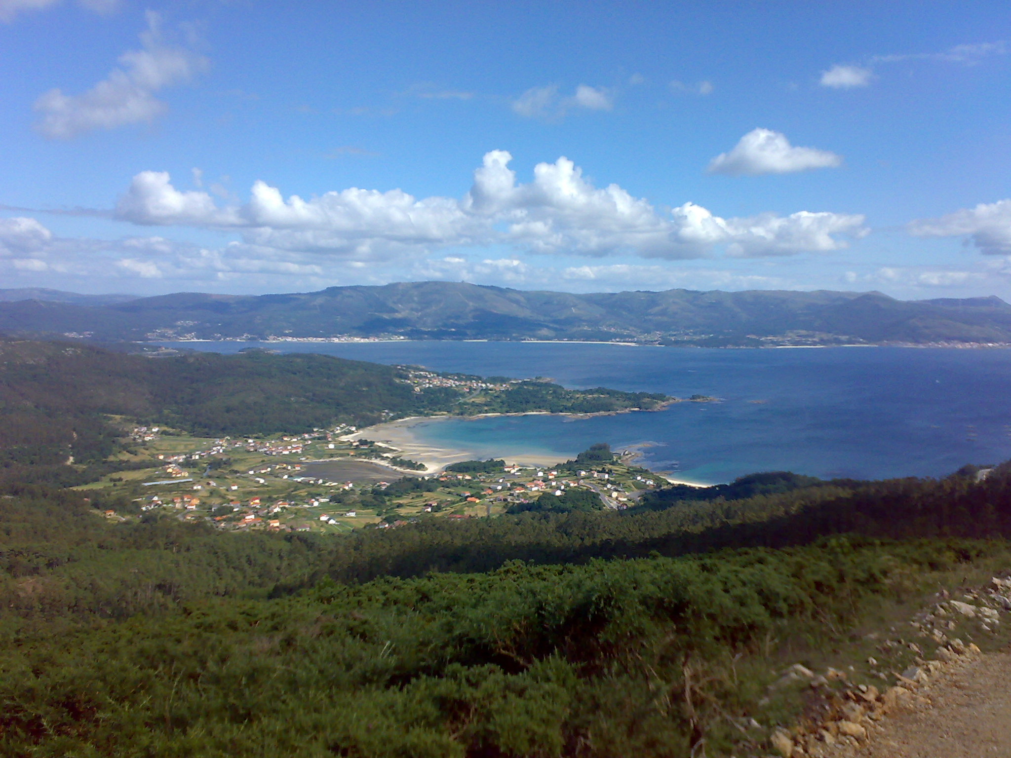 Vista xeral da parroquia de Abelleira